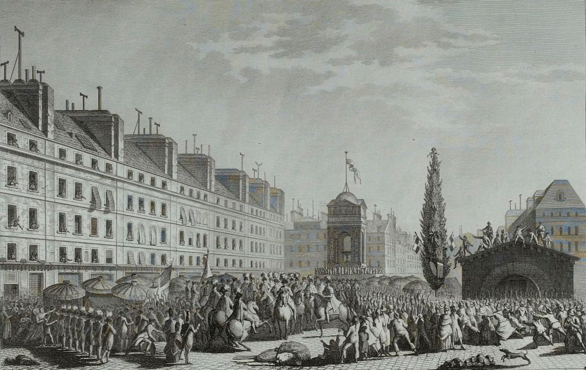 Proclamation de la Constitution de 1791, place du marché des Innocents le 14 septembre 1791. Musée de la révolution française - Vizille.